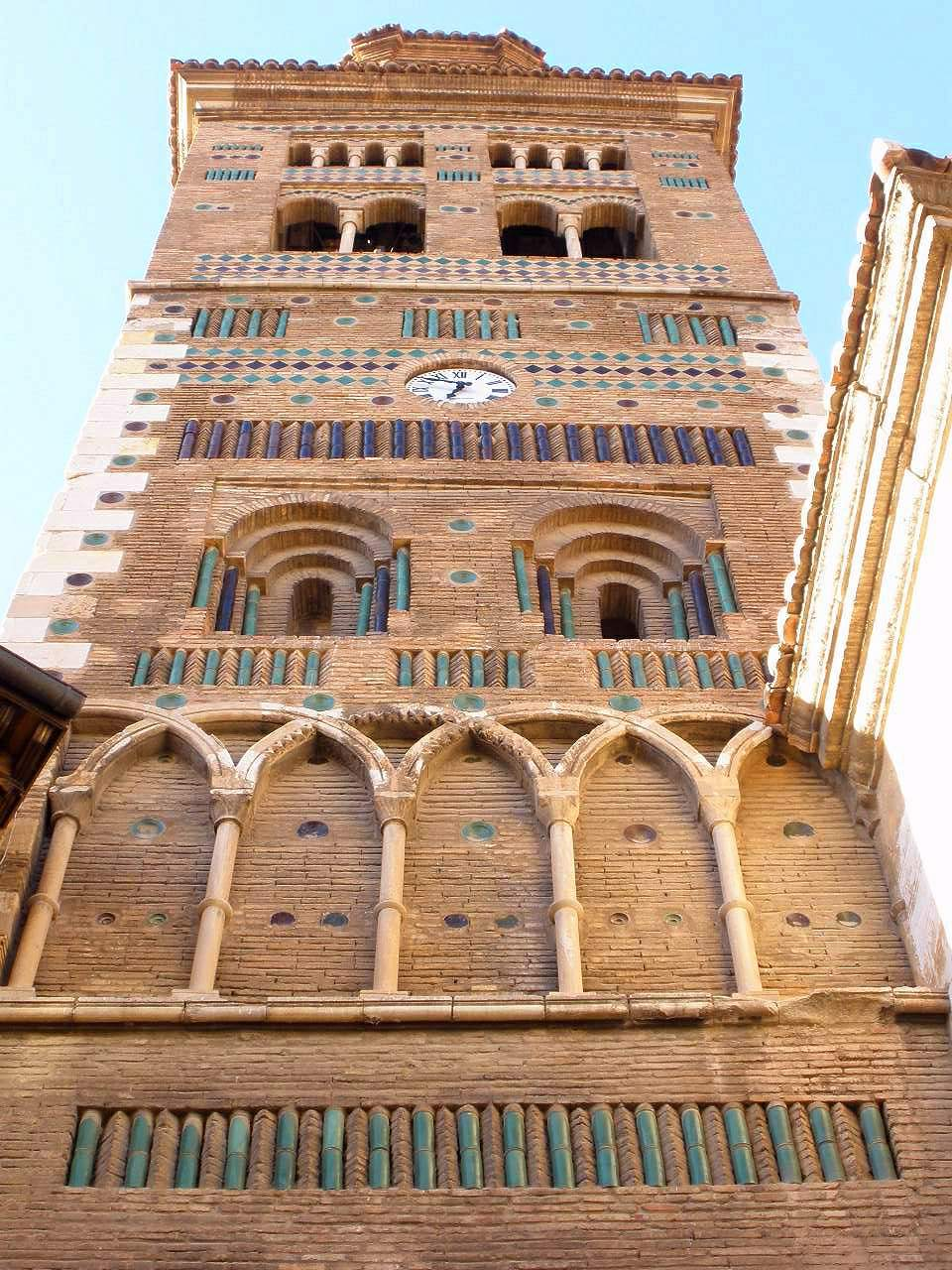 Catedral de Santa María de Mediavilla, Teruel